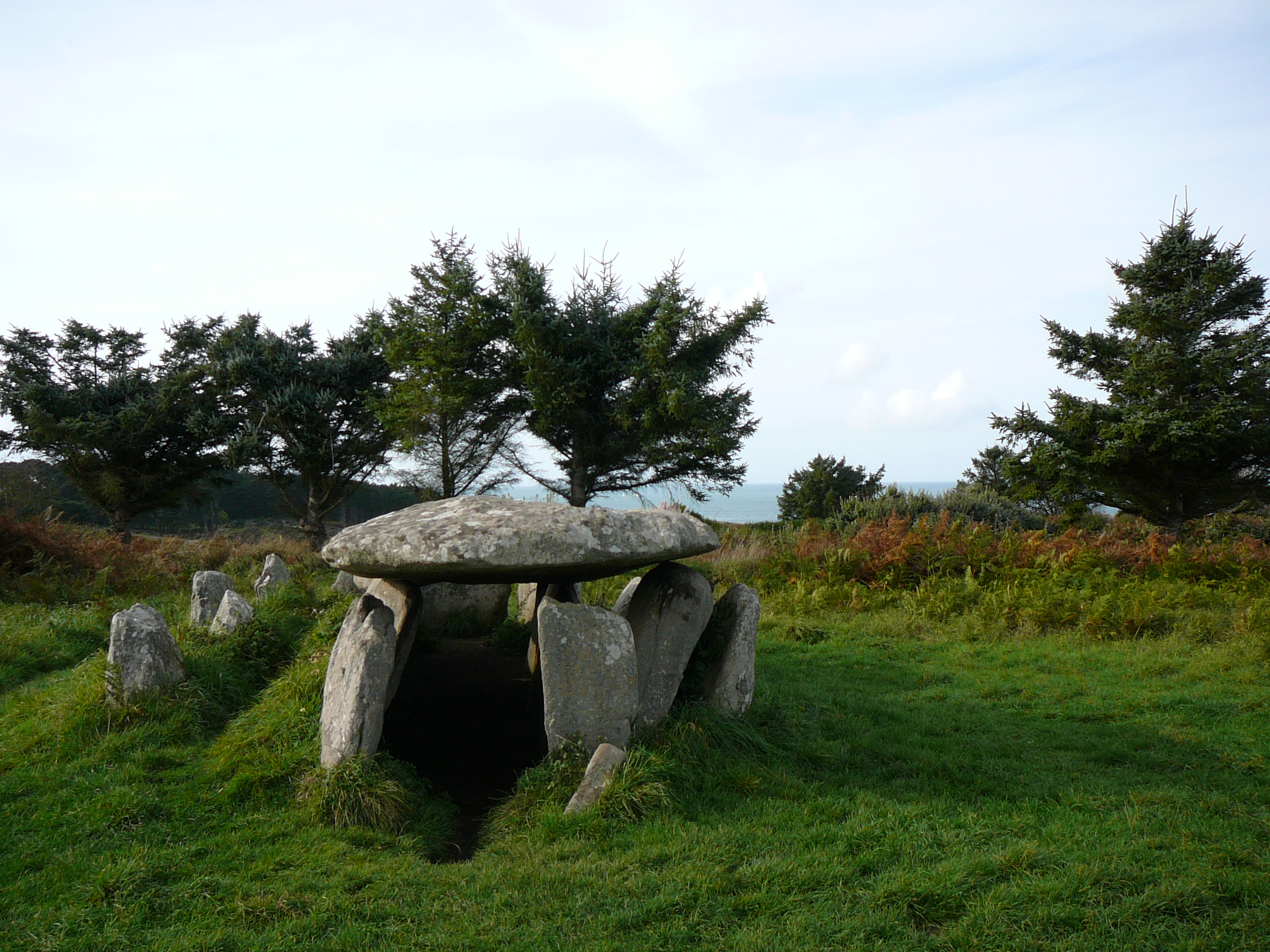 Allée couverte de l'Ile Grande au point culminant de l'île (Pleumeur Bodou 22) .